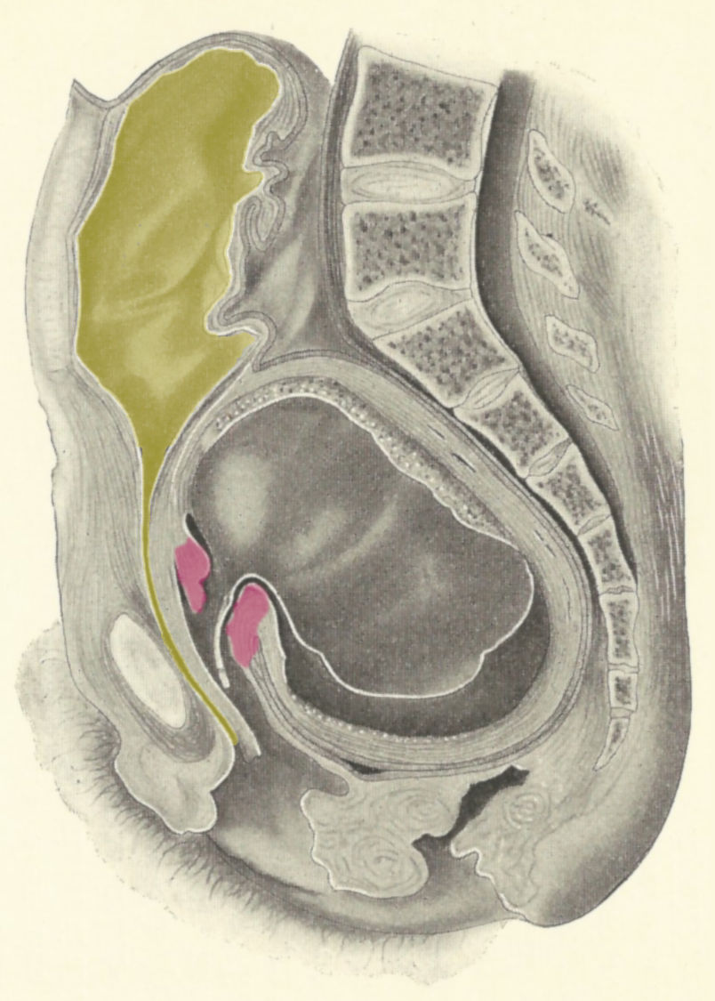 Zeichnung eines Uterus incarceratus modifziert nach File:Incarcerateduterus.JPG mit der Harnblase und dem Harnleiter gelb und dem Gebärmutterhals rosa markiert.